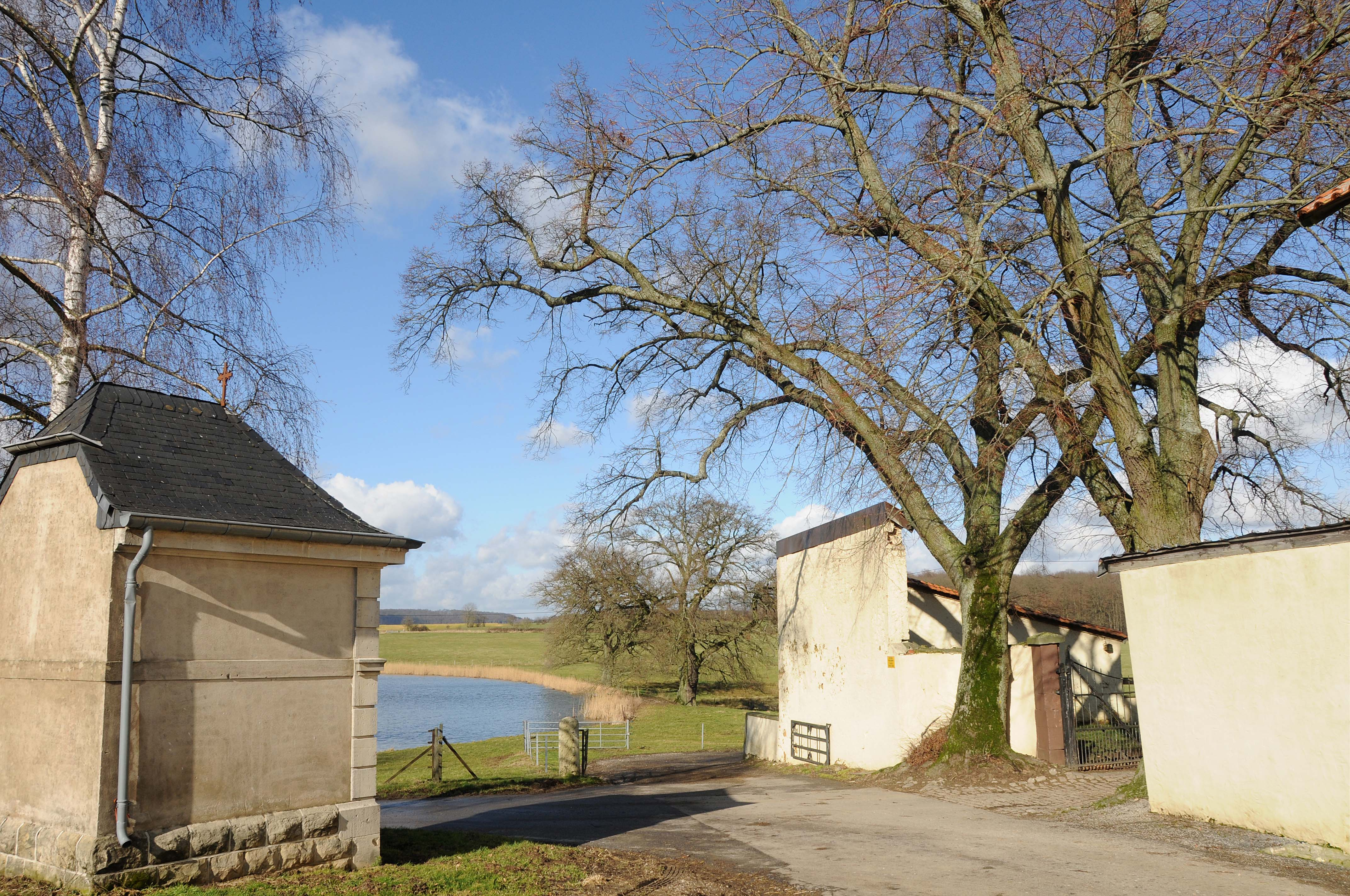 Lannen a Wier vum Pläitrengerhaff.